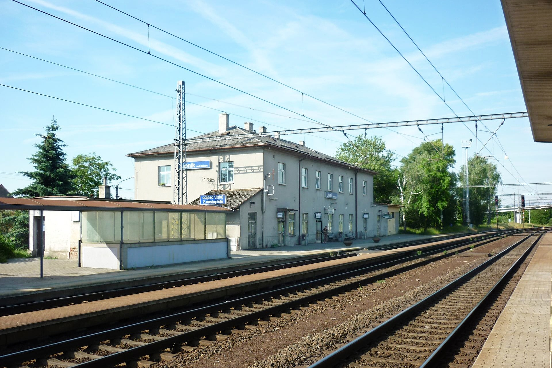 Nádraží ČD v Lipníku nad Bečvou